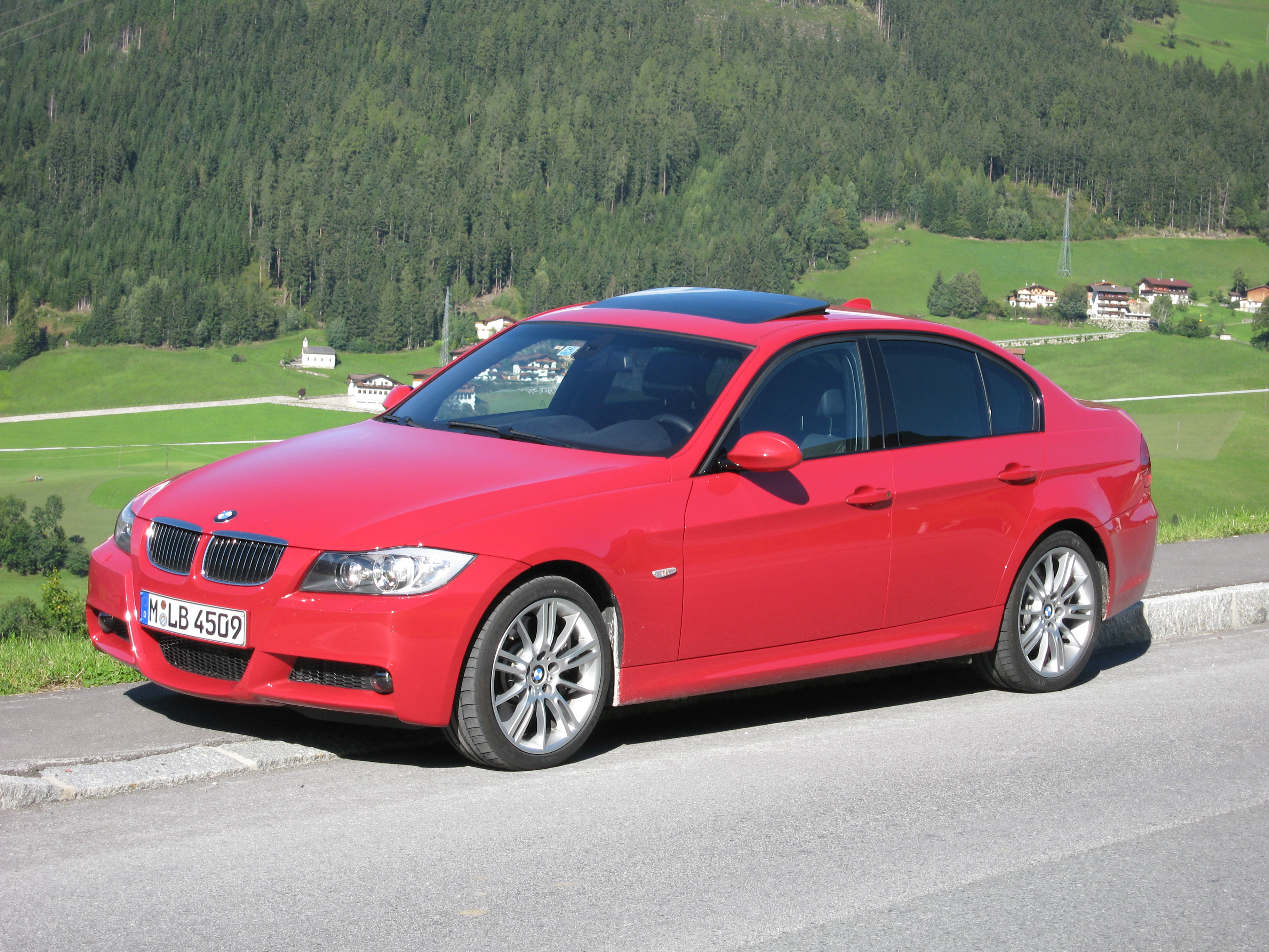 BMW E90 335xi